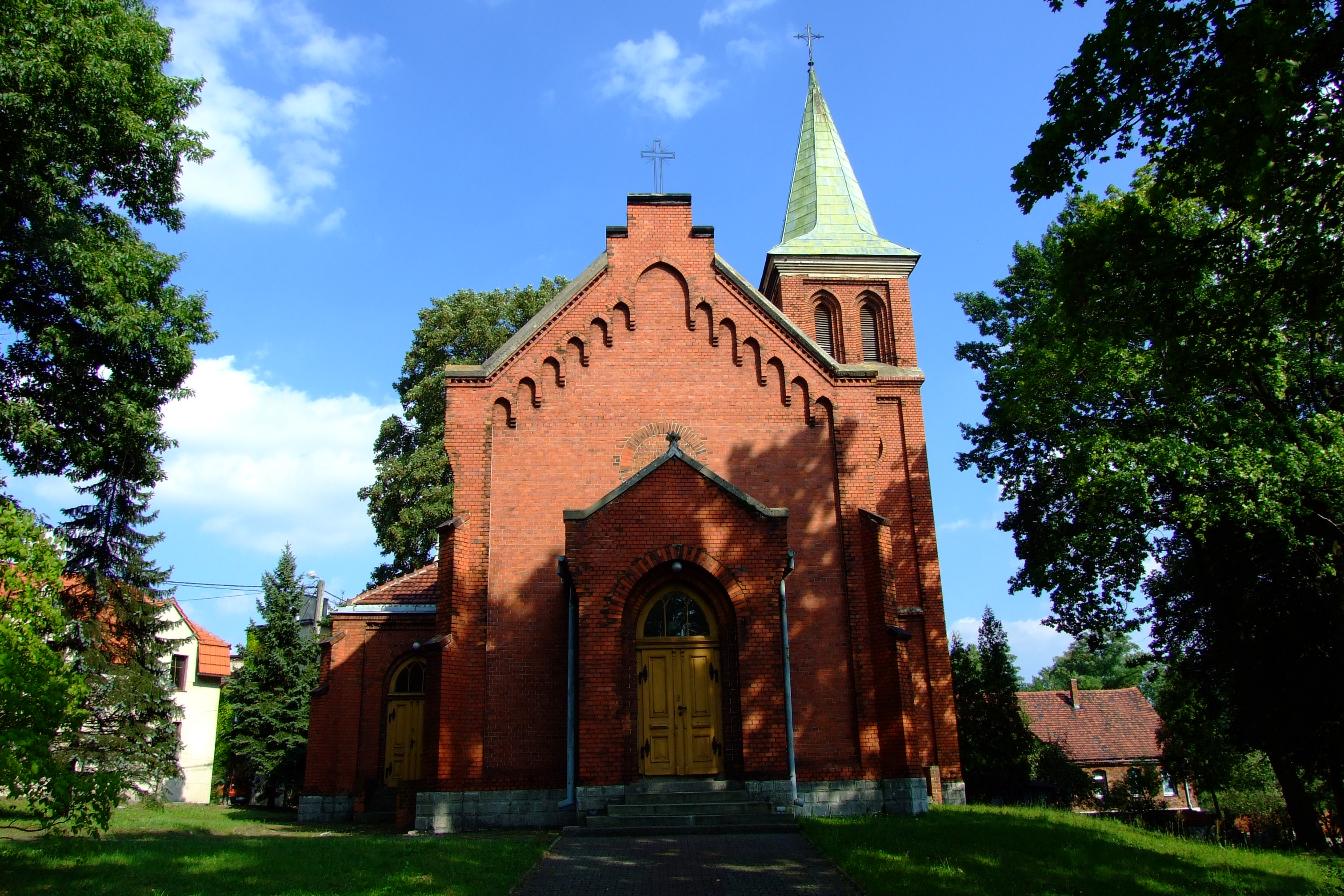 Ewangelicki kościół Świętych Piotra i Pawła w Pyskowicach